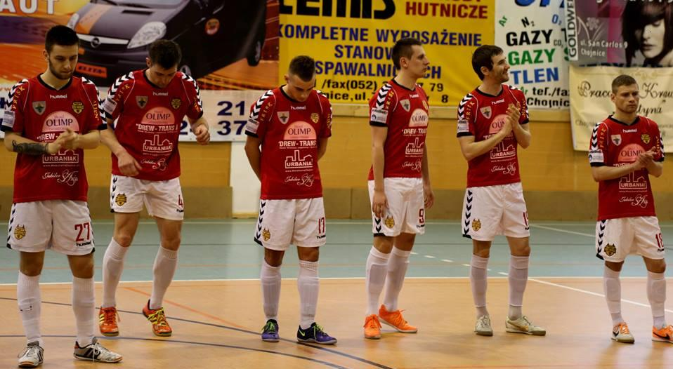 Prezentacja zepspołu Red Devils Chojnice przed meczem z Wisłą Krakbet Kraków.